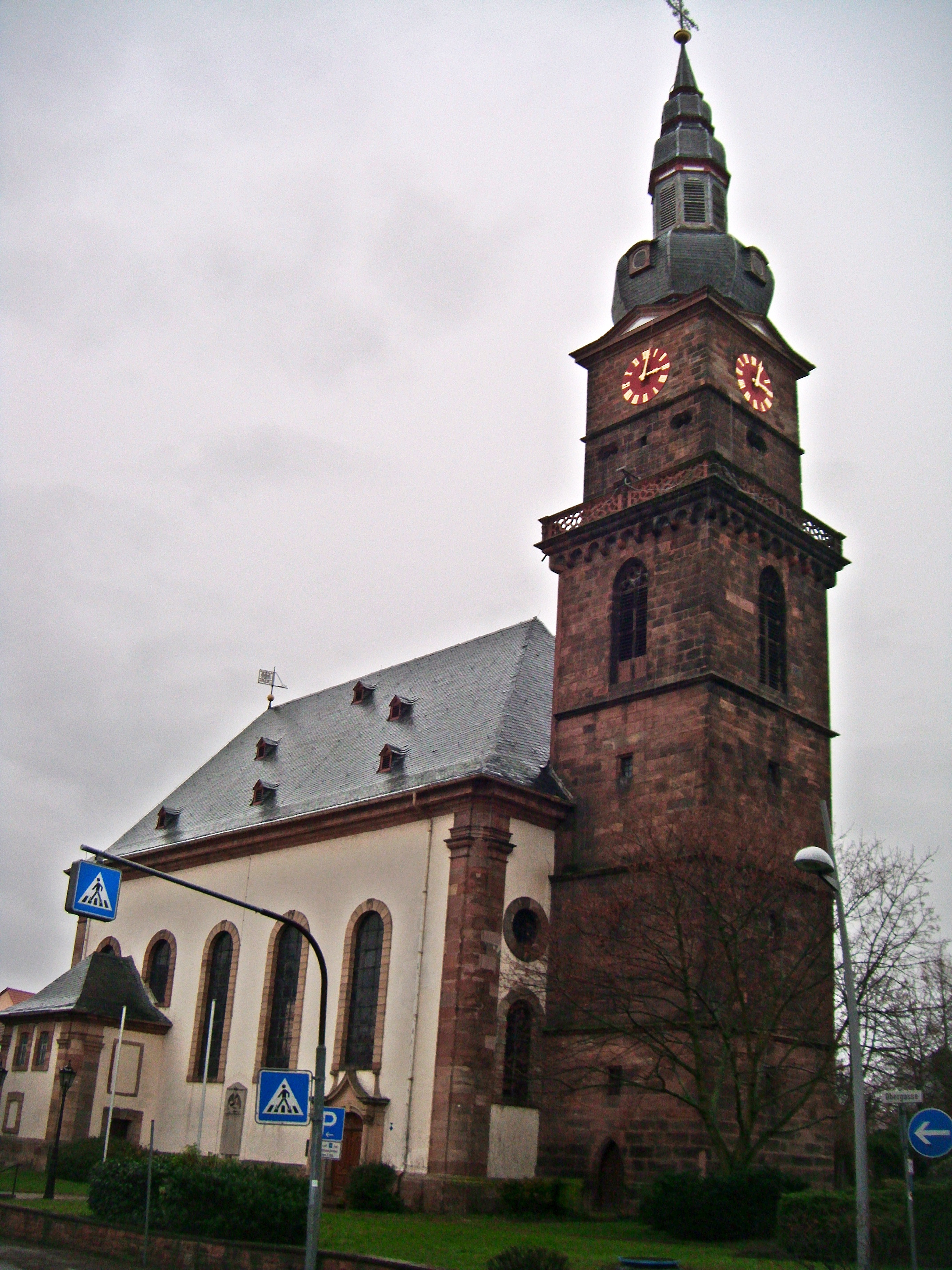 Prot. Martinskirche Grünstadt, ehemalige Eigenkirche der Abtei Glandern in Lothringen